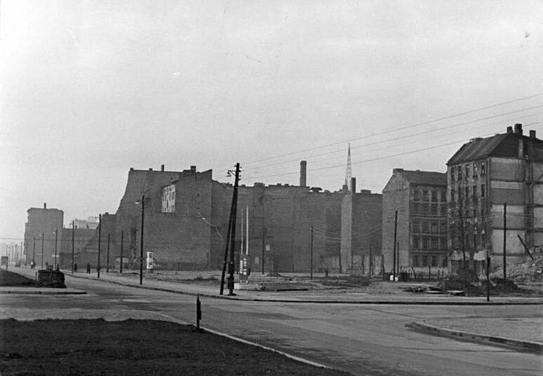 Zentralbild Martin 17.1.1952 Nationales Aufbauprogramm. Als städtebaulich bedeutendste Strasse im Osten Berlins wird die Stalinallee von 75 auf 80 Meter verbreitert und mit sieben- bis neungeschossigen grossen Wohnblockeinheiten bebaut werden. Bauplatz-Übersichten der projektierten Wohnbaublöcke Nord und Süd in der Stalinallee. UBz: Nordseite links: Stalinallee, rechts: Friedensstrasse (Standpunkt: Mitte Stalinallee, gegenüber vom Baubüro des Hochhauses Weberwiese) .